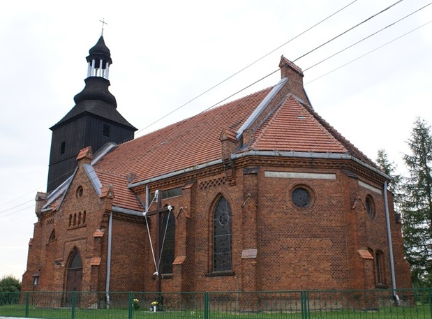 Pągów - dawny kościół ewangelicki, obecnie rzymskokatolicki filialny p.w. śś. Ap. Ap. Piotra i Pawła, poł. XIX. (Kościół w obecnym kształcie wzniesiono w XV w., choć pierwsze wzmianki na jego temat pochodzą z roku 1376. Kościół zbudowany z cegły w stylu gotyckim. Dolna kondygnacja wymurowana z kamienia. Hełm na wieży początkowo zbudowany jako baniasty, później, w czasie rozbudowy w XVIII w. przekształcono na ośmiopolowy. Dzwon kościelny odlany przez ludwisarza z Wrocławia Kaspra Koerberga w 1738 r. Ołtarz główny kościoła to dwukondygnacyjny zabytek z przełomu XVII i XVIII wieku. W jego centrum znajduje się rzeźba Chrystusa Ukrzyżowanego. Ambona, z końca XVII w., posiada bogatą, barokową dekorację z motywami roślino-owocowymi i malowanymi wizerunkami apostołów).